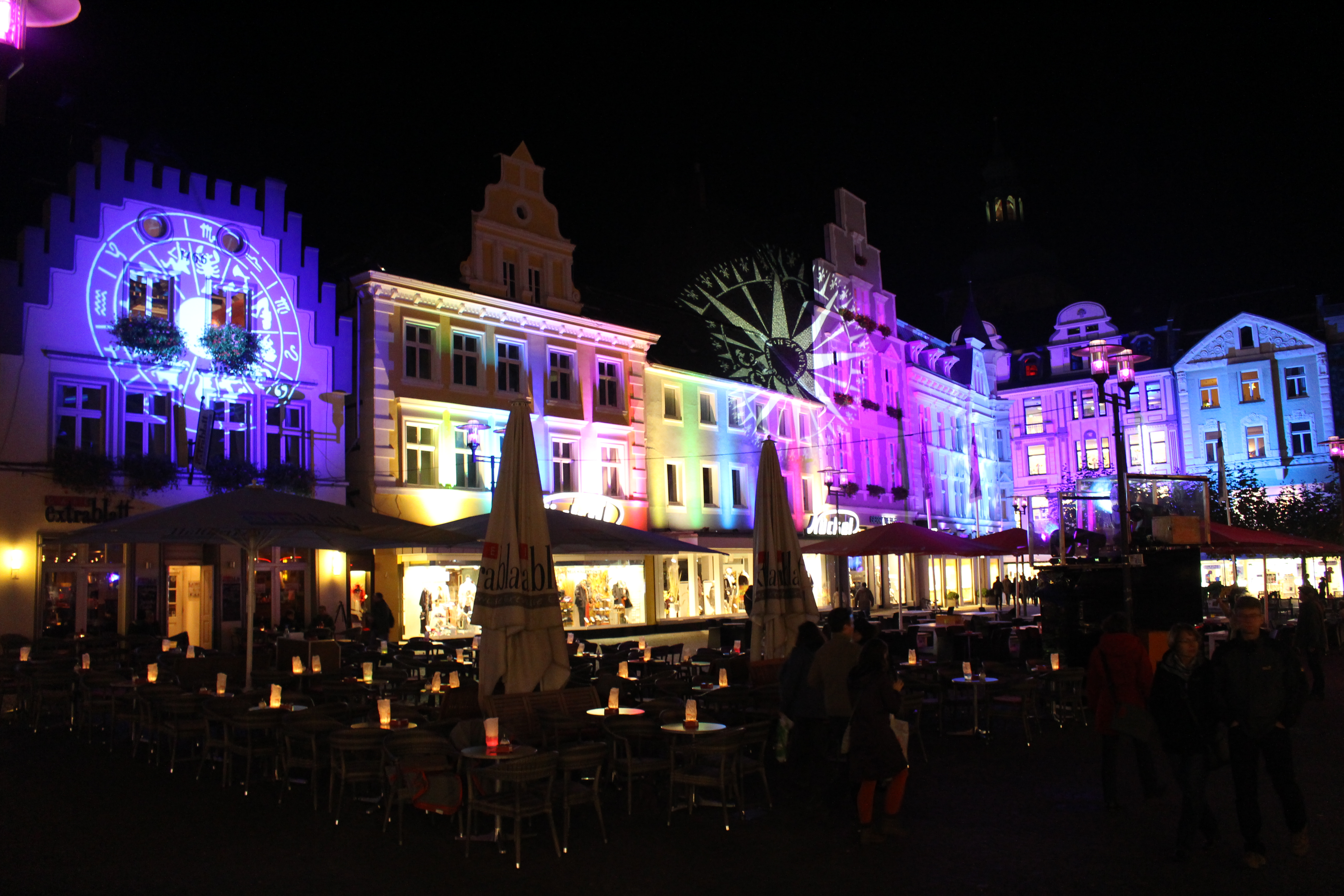 Altstadtmarkt RE ("RE leuchtet")